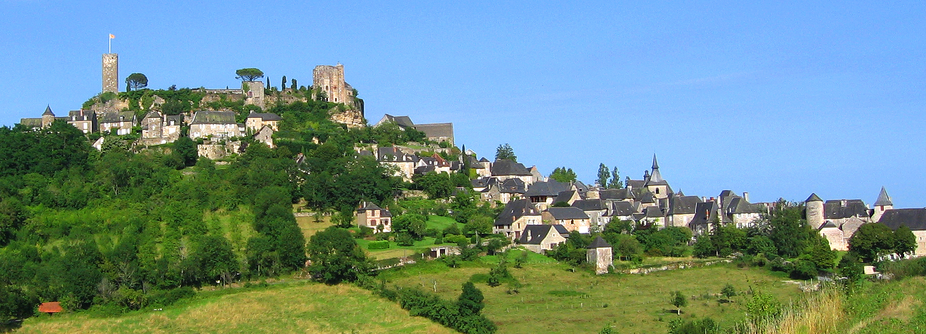 Corrèze - Turenne